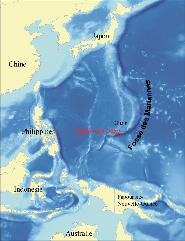 Carte montrant la position de la fosse des Mariannes.